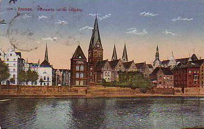 1922 Old images